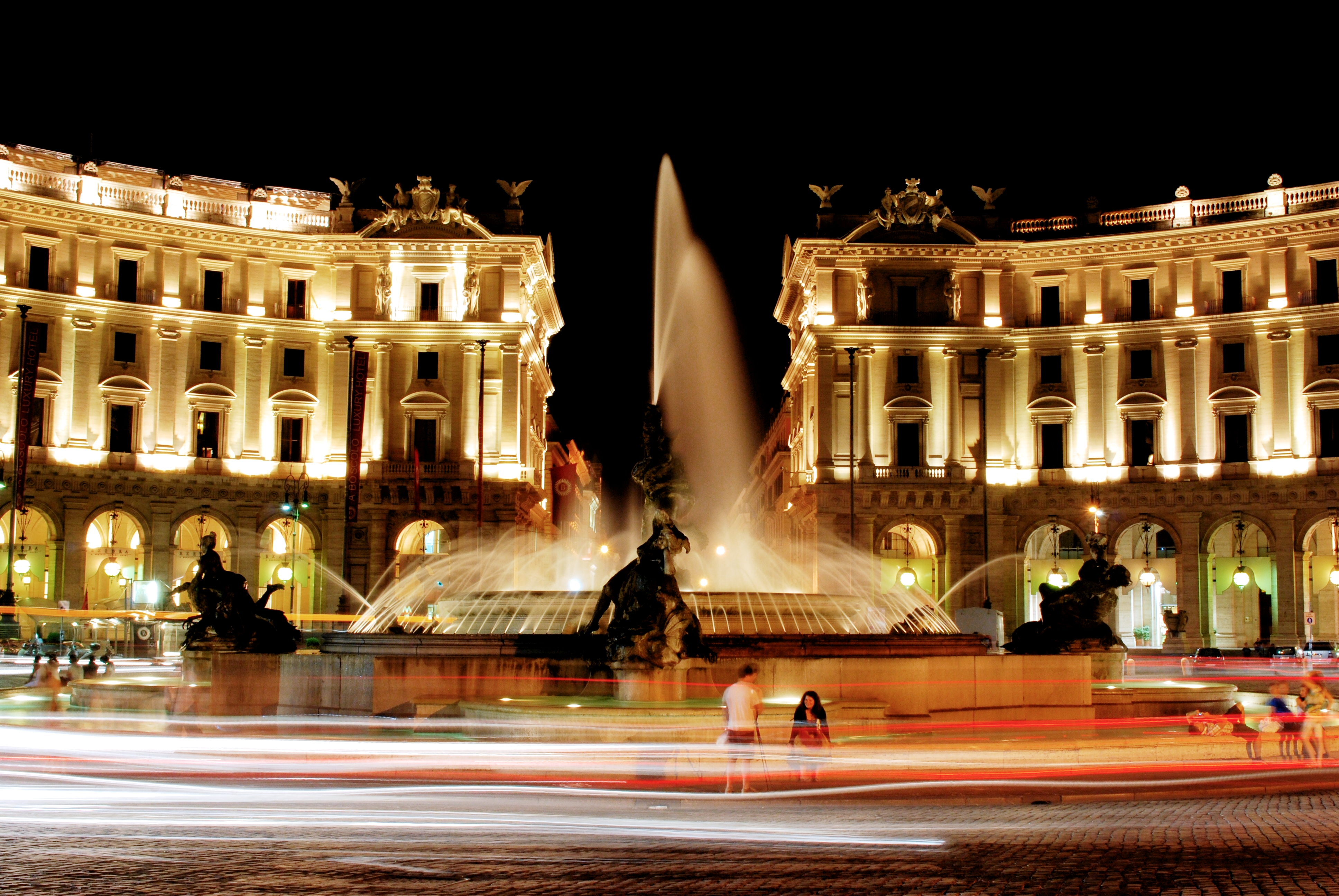 Foto piazza della repubblica Roma